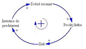 Reinforcing causal loop